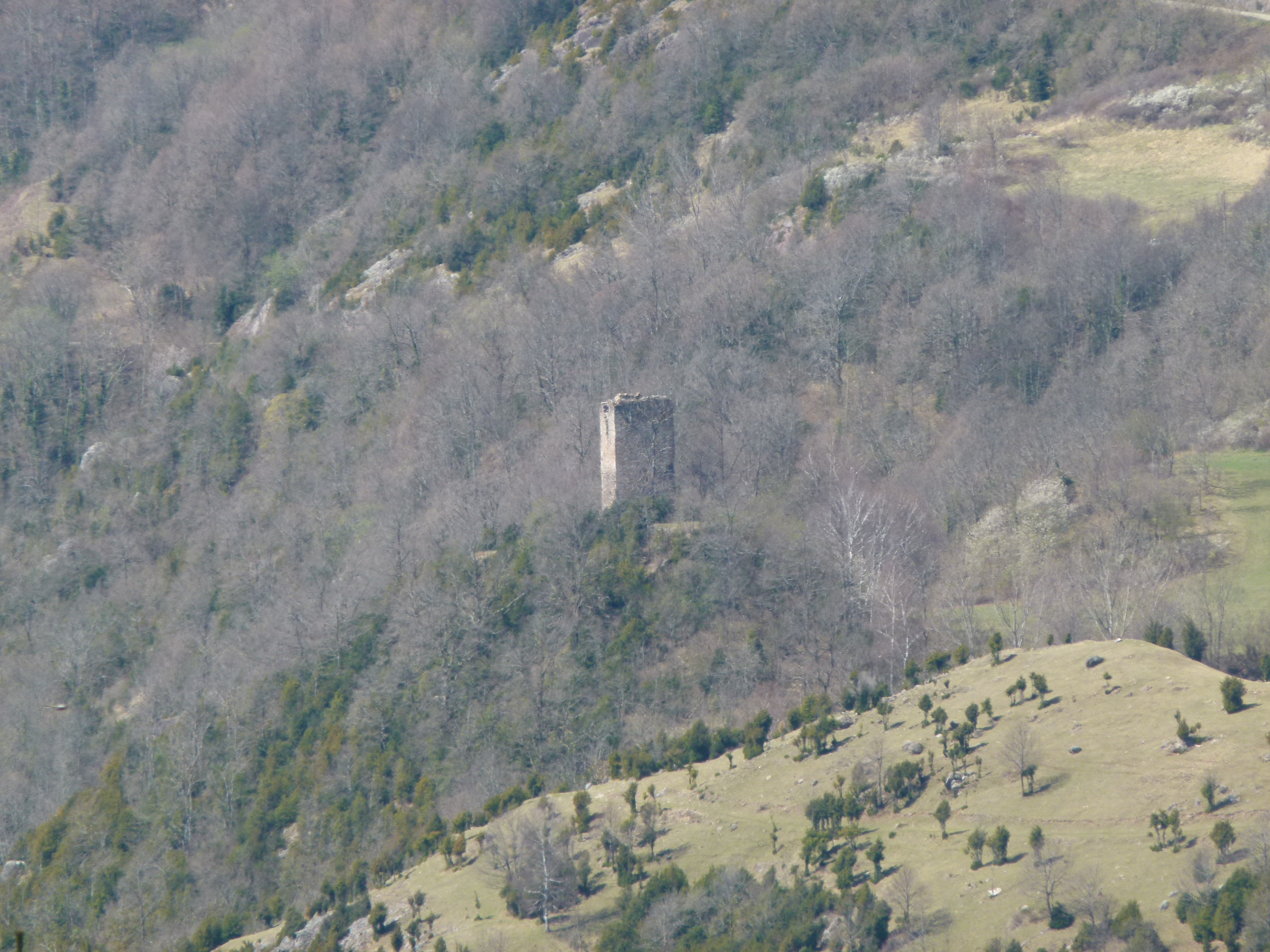 Torra Cavallera vista des de St. Antoni